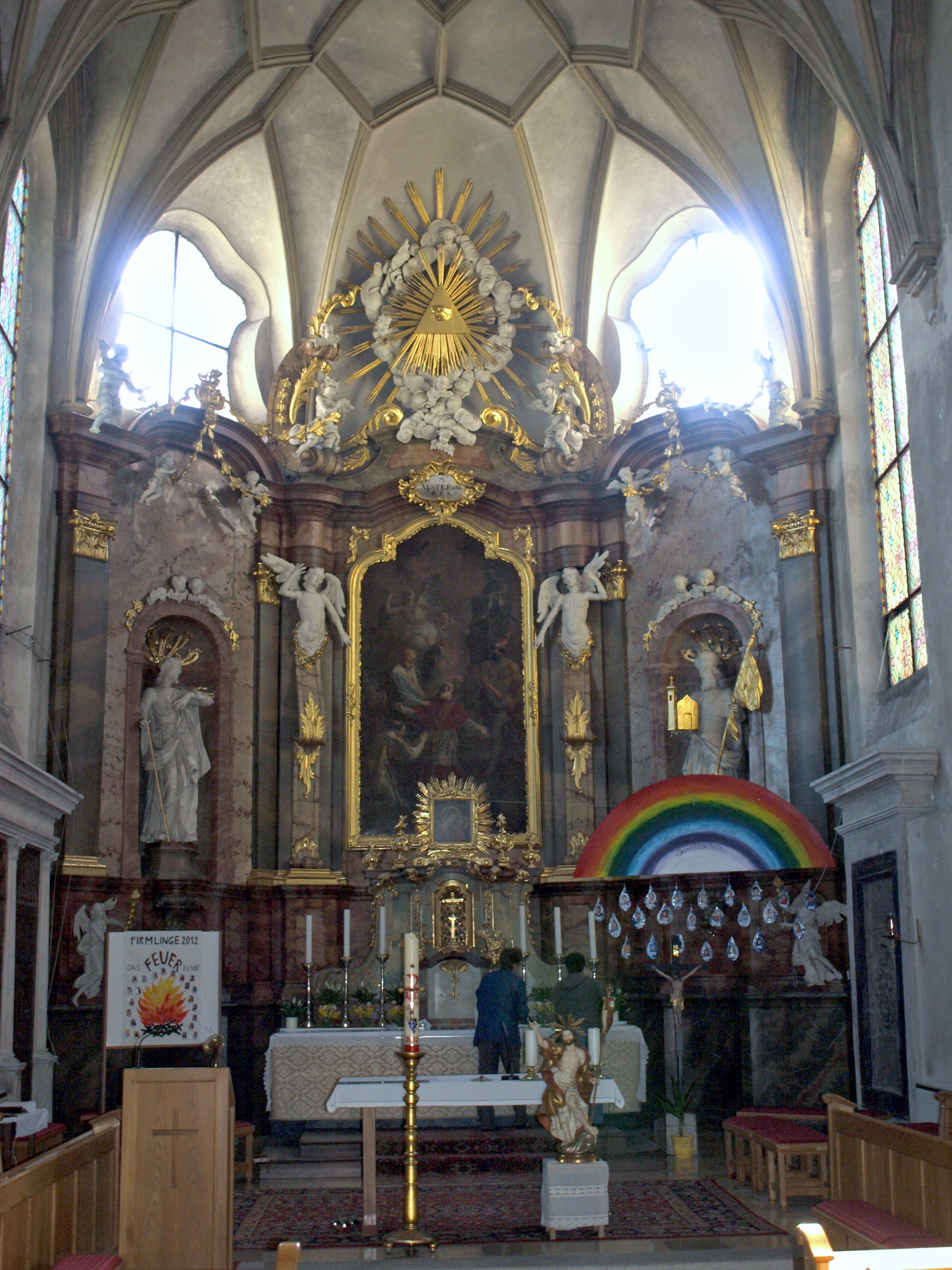 Kath. Pfarrkirche hl. Xystus